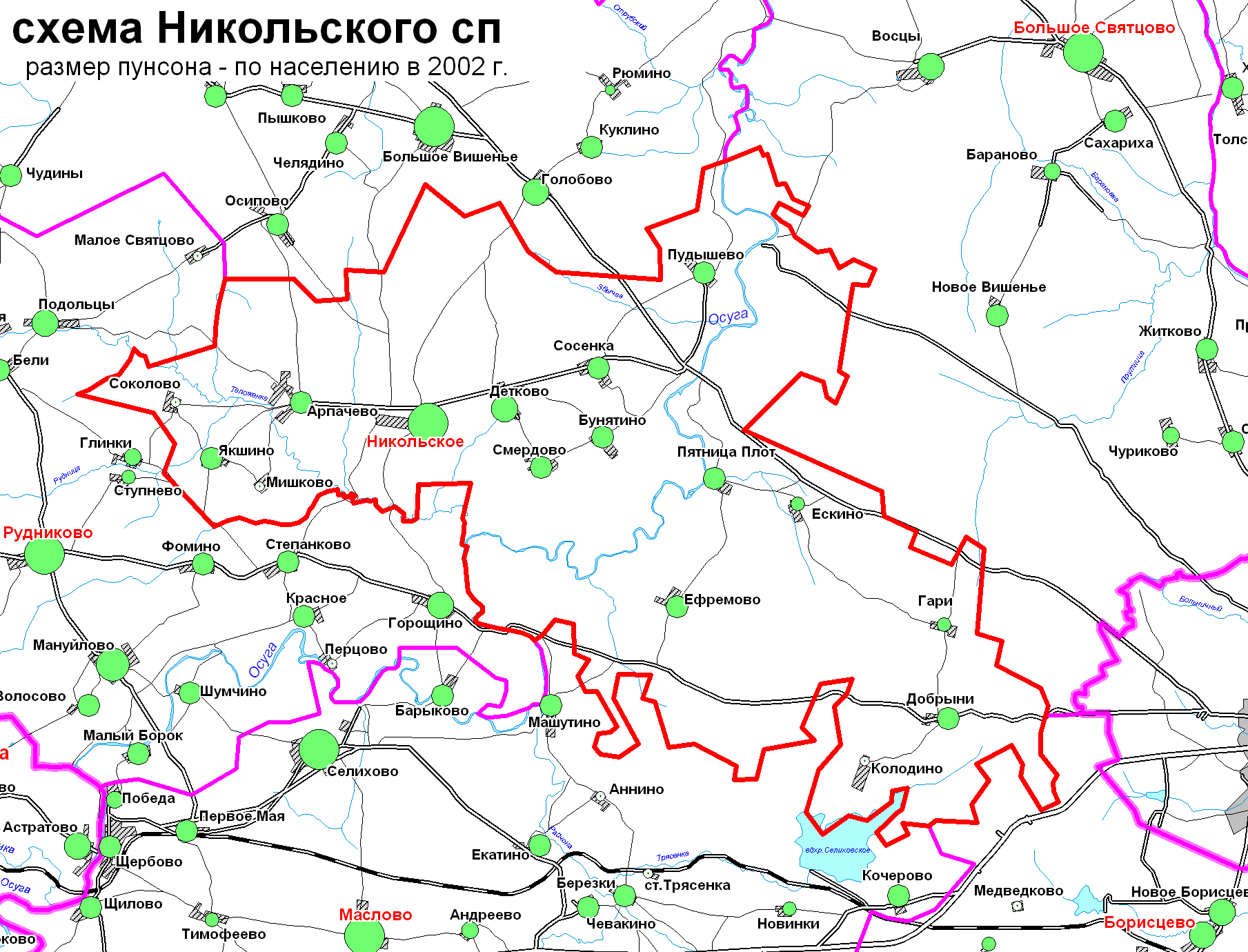 Схема Никольского сп в Торжокском р-не